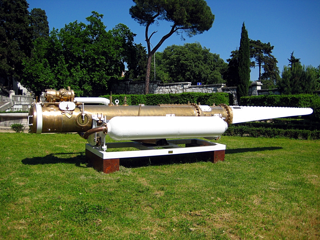 Dvorište Pomorskog i povijesnog muzeja hrvatskog primorja u Rijeci. Cijev za lansiranje torpeda, Silurificio Whitehead di Fiume S. A., Rijeka, treće desetljeće 20. stoljeća, željezo, čelik, mjed, bakar, strojna izrada, 156 × 716 cm, PPMHP KPO-ZO 22249. Lansirna cijev za torpeda, koja se nalazila na lansirnoj stanici u riječkoj tvornici. To je posljednja cijev na parni pogon korištena na lansirnoj stanici.